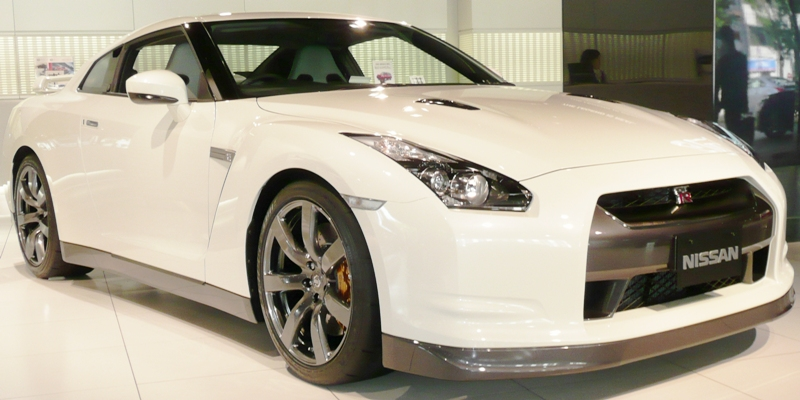 Nissan GT-R.